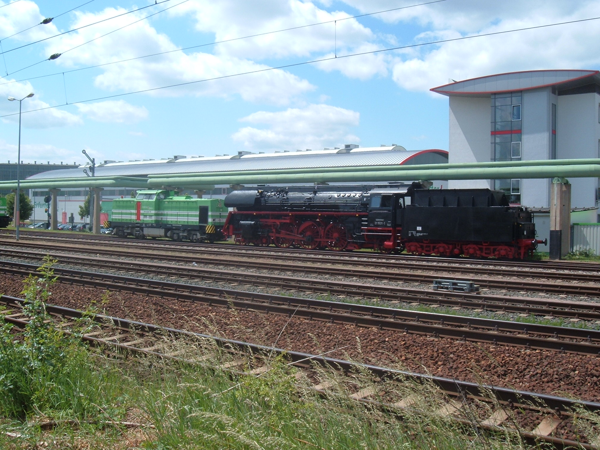 01 531 des EBM Arnstadt mit Lisa 1 im Bahnbetriebswerk Erfurt Ost.